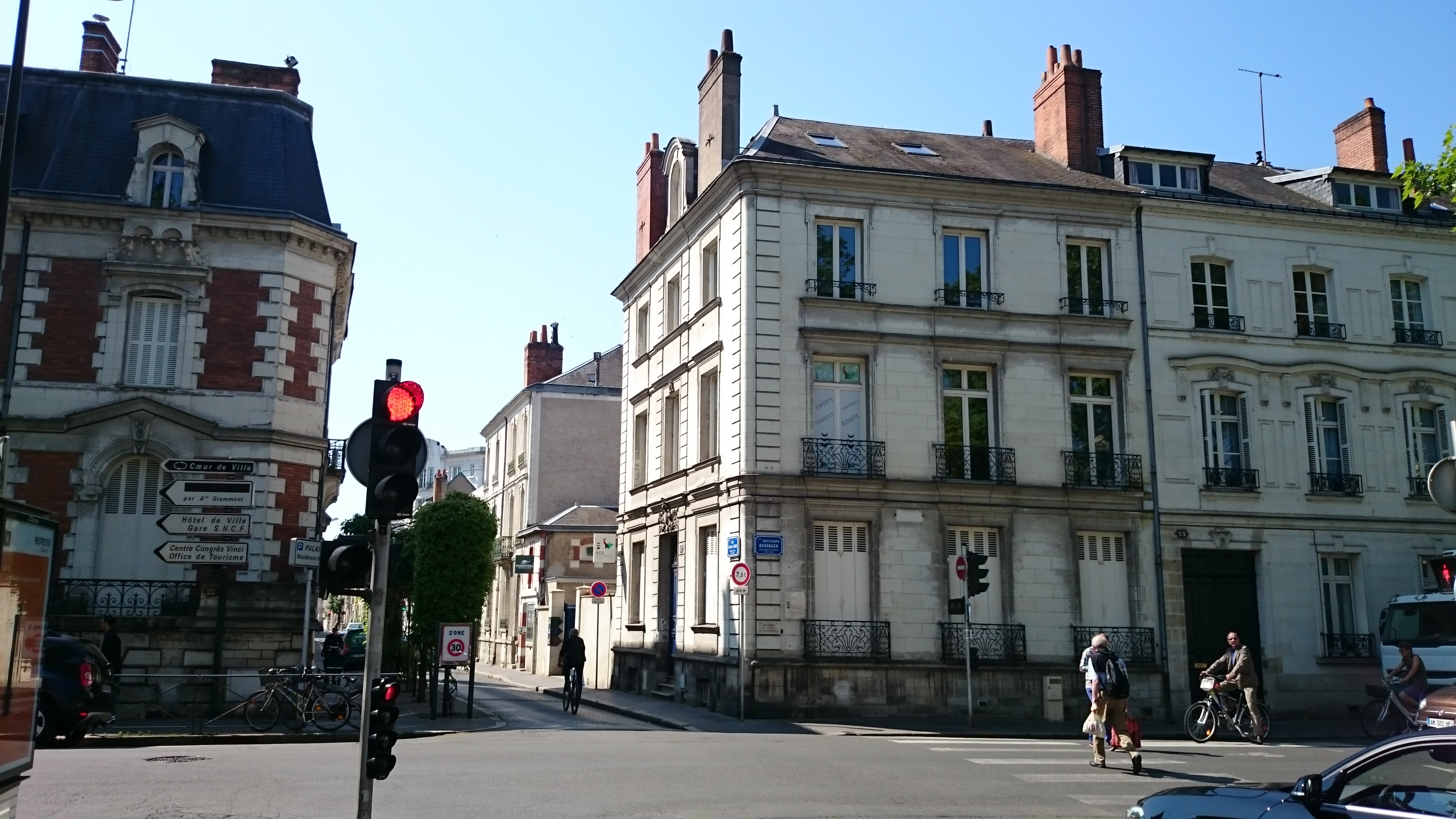 Centro de la ciudad de Tours